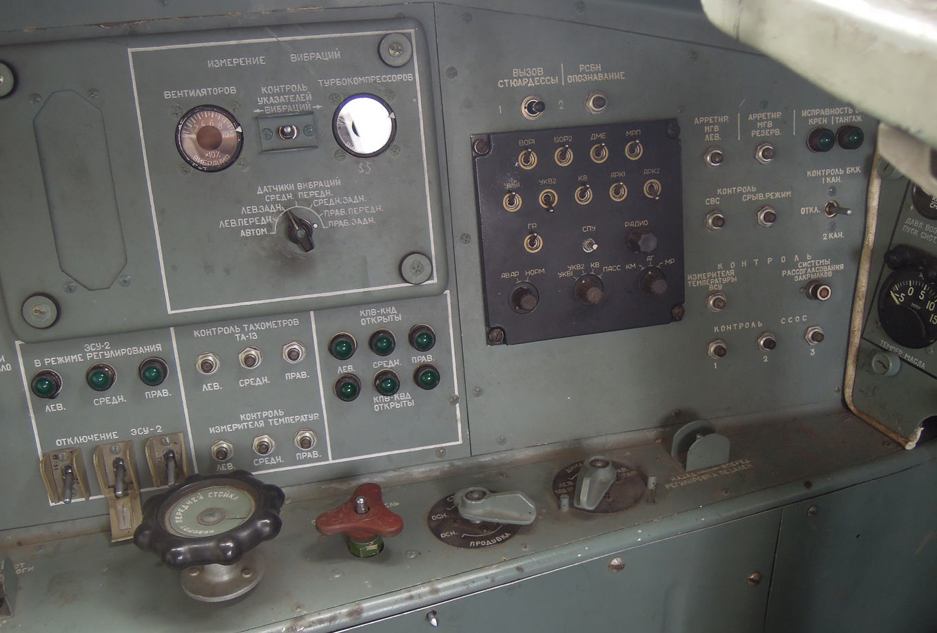 Левый боковой пульт самолёта Як-42. Слева приборы контроля двигателей, правее абонентский аппарат СПУ, далее кнопки пилотажно-навигационного комплекса.